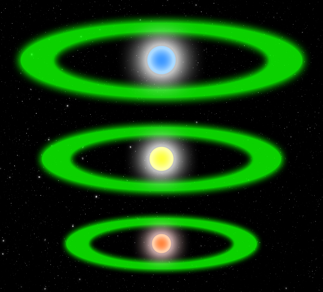 Ilustración que refleja la extensión de la zona habitable en función del tipo de estrella.